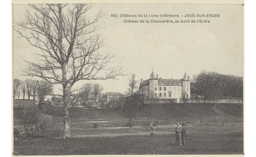 Le Chateau de La Chauvelière à Joué-sur-Erdre.